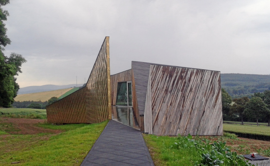 Infogebäude am Harzhorn im Juni 2014